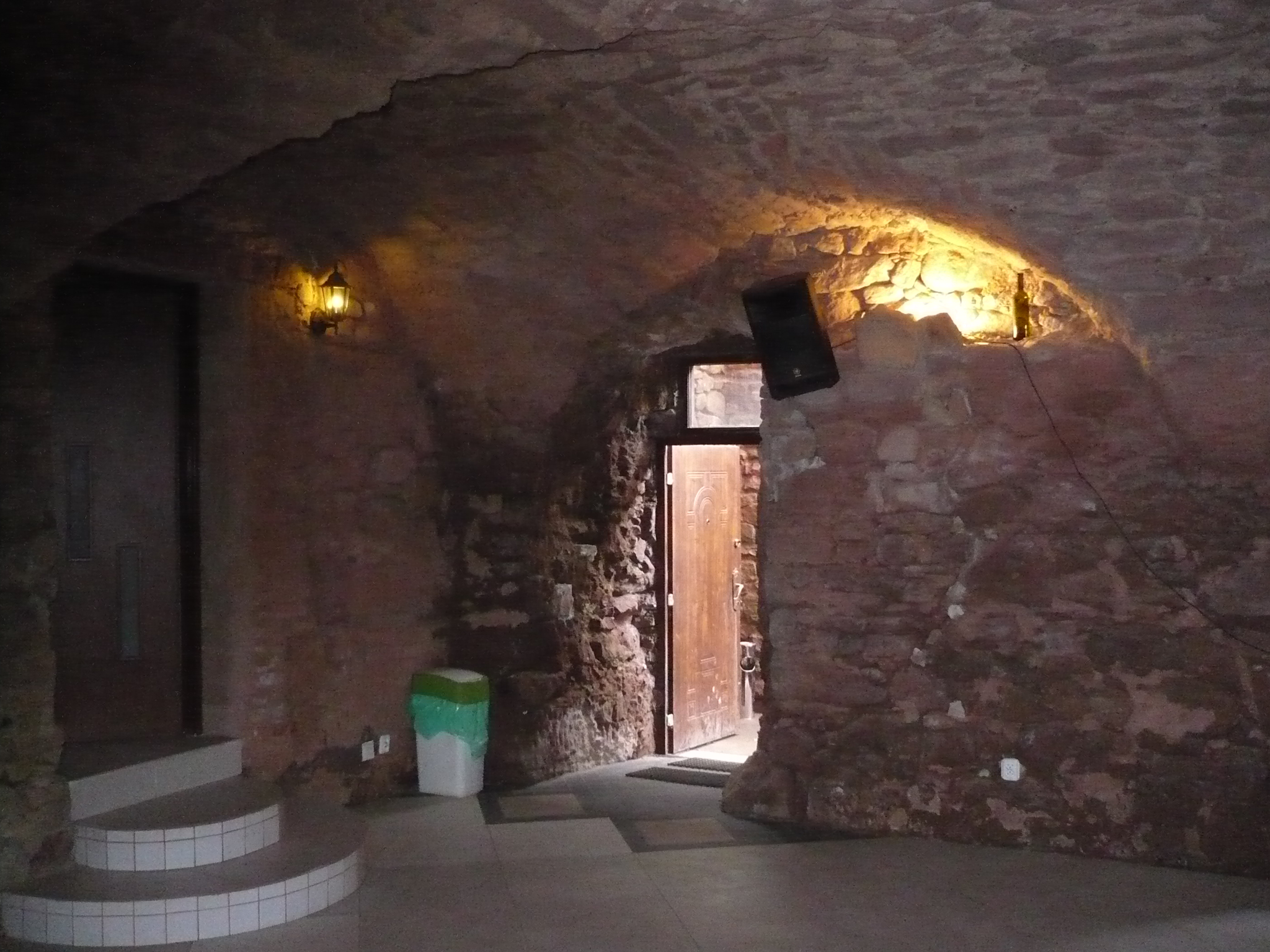 Nowa Ruda, ul. Kościelna 30 - Dwór Górny, obecnie hotel, XVII, XIX w. (zabytek nr A/940/652/WŁ z 25.05.1977)